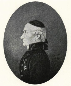 Pehr Fabian Aurivillius avmålad av Wilhelm Le Moine 1832.